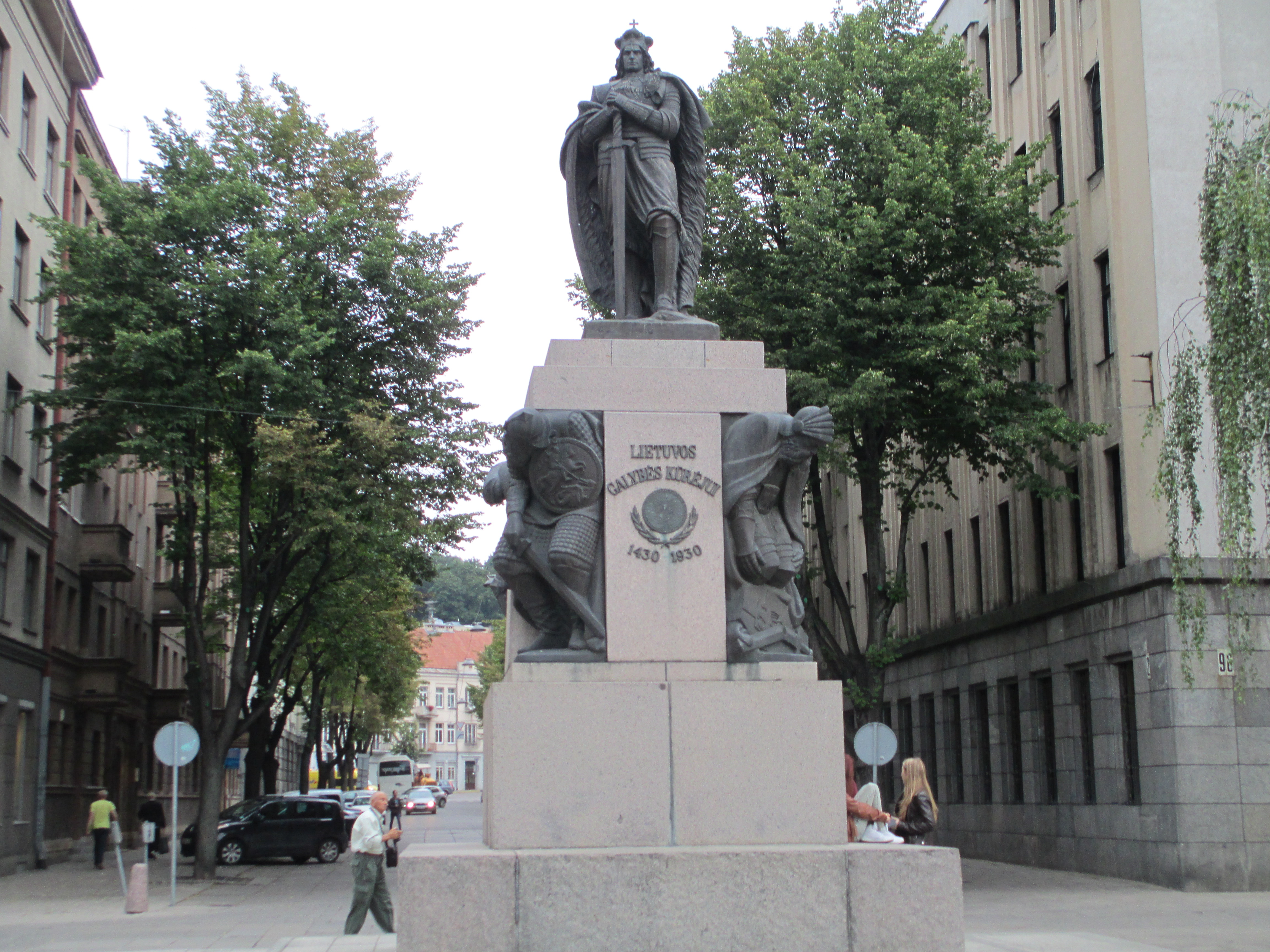 Vytauto Didžiojo paminklas Kaune